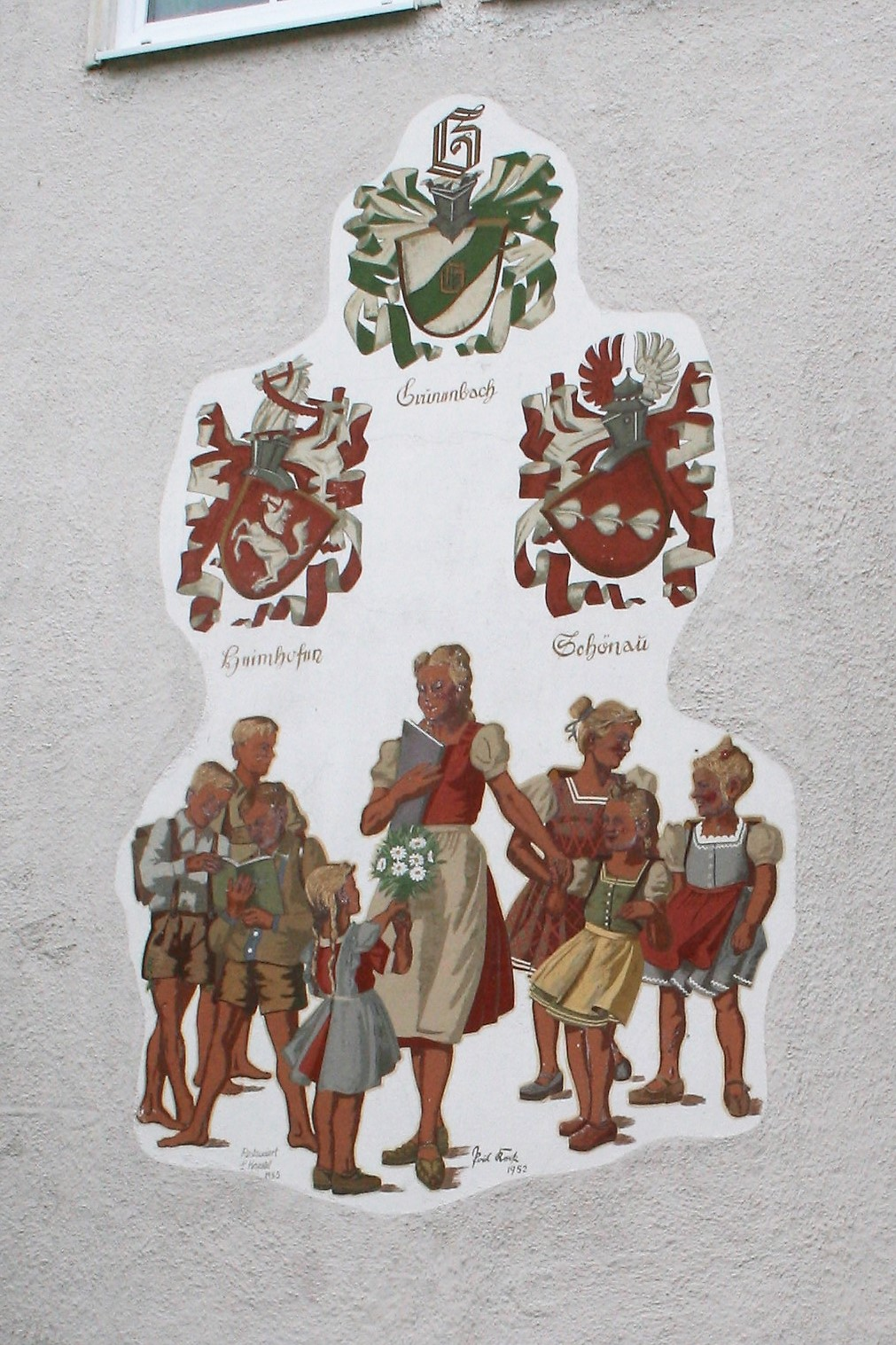 Gemälde von Paul Keck am ehemaligen Schulhaus in Grünenbach.